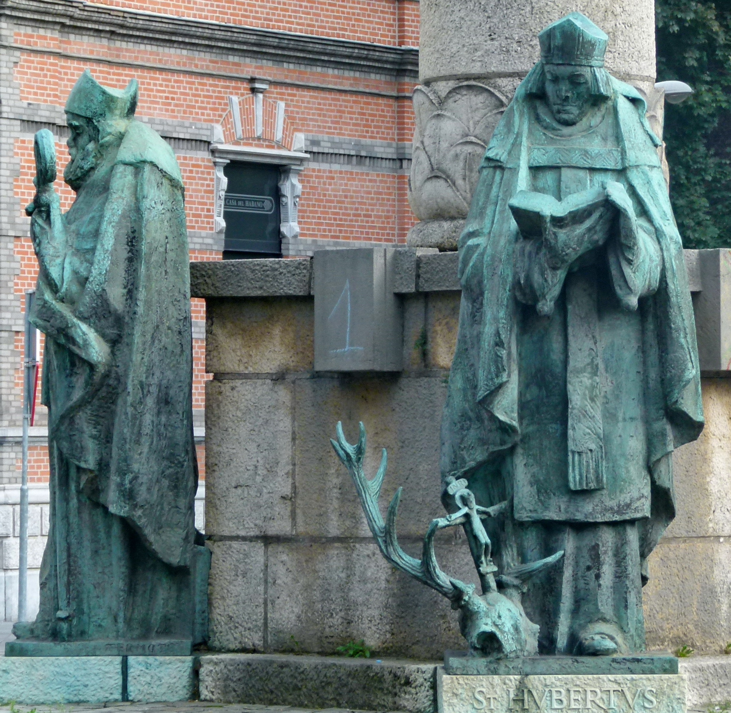 Mariazuil of monument van de vier heilige bisschoppen van Maastricht op de kruising van de Stationsstraat en de Wilhelminasingel in Wyck-Maastricht. Links: Sint-Monulfus. Rechts: Sint-Hubertus.